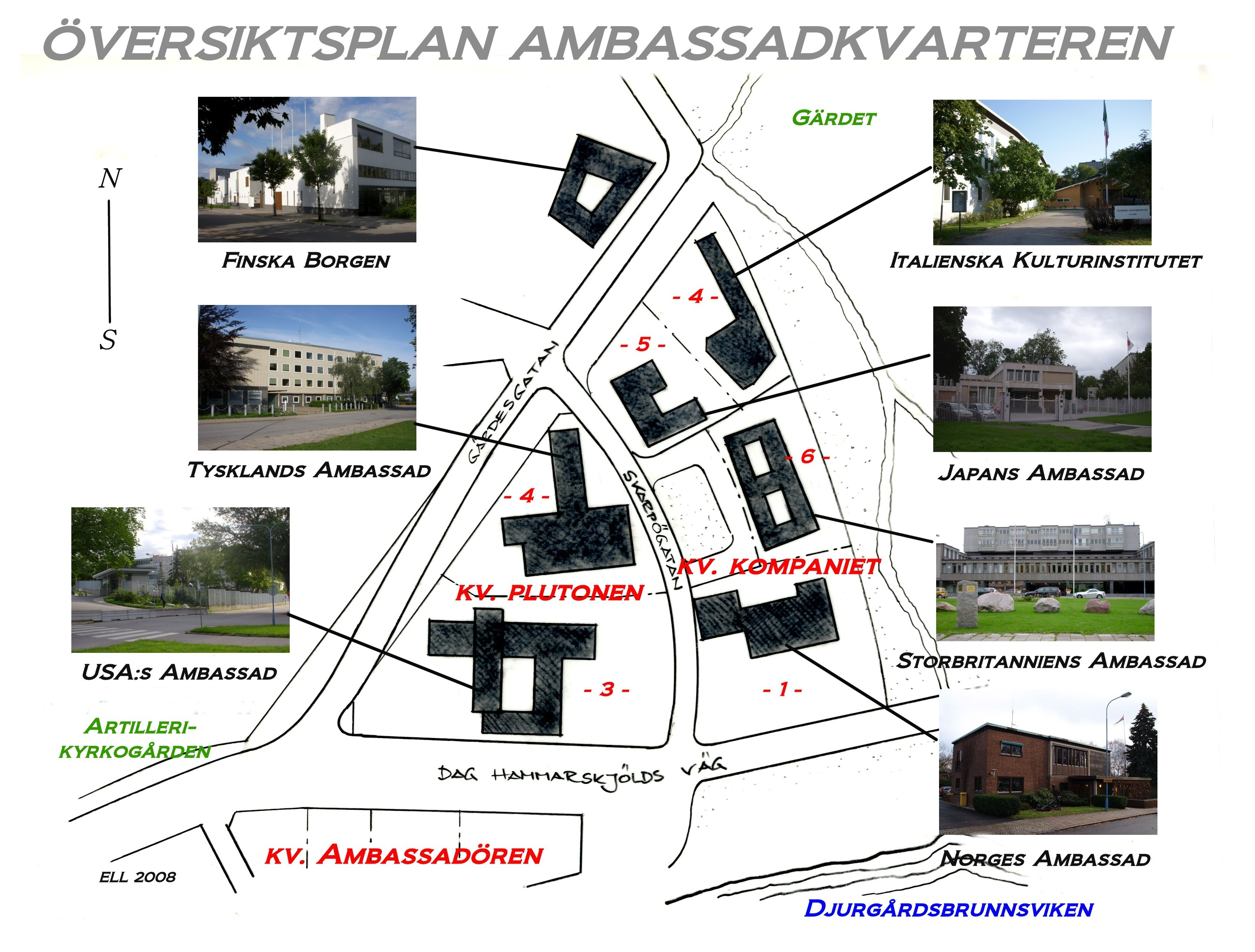 Översiktsplan över ambassadkvarteren i Diplomatstaden i Stockholm